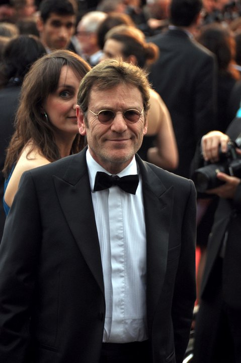 Tchéky Karyo au festival de Cannes